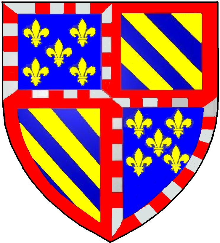 Blason Région Bourgogne Source:10px Wikimega****-@@@-fr 27 mai 2008 à 08:57 (CEST) Licence: Catégorie:Blasons